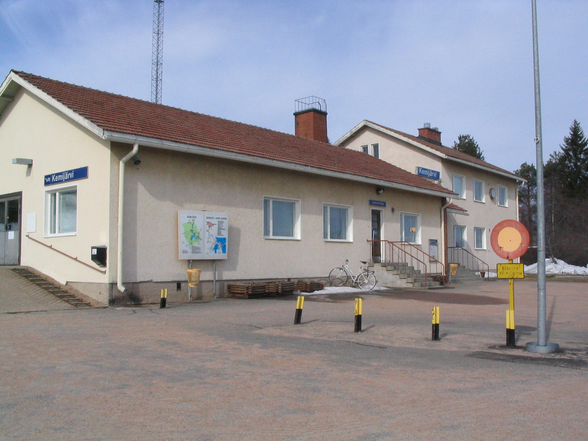 Kemijärven rautatieasema.